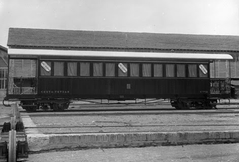 Coche unificado de 3º Clase del Ferrocarril Ceuta-Tetuán, hacia 1930